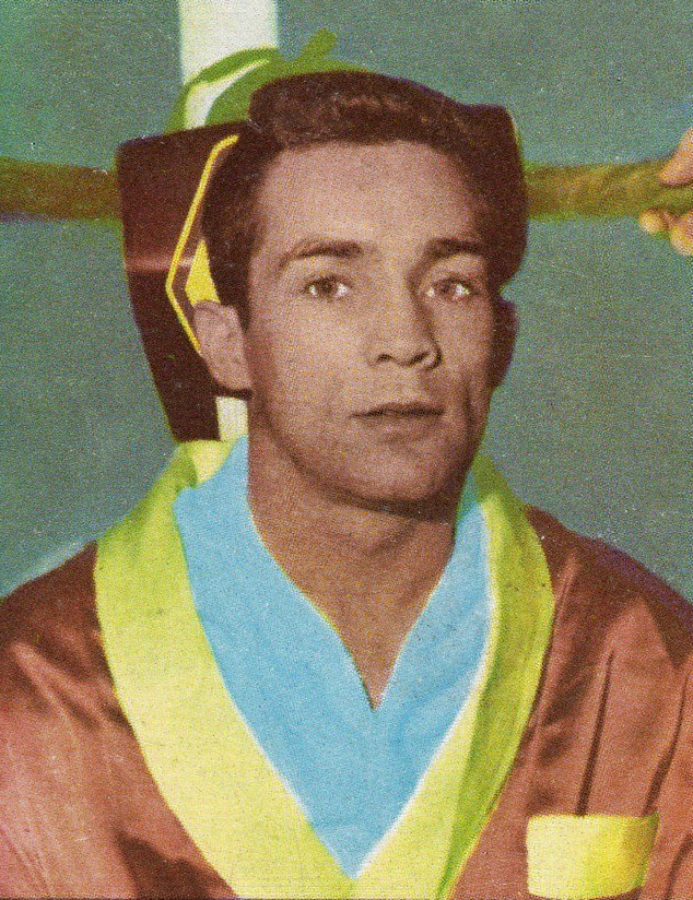 FIGURINA CAMPIONI DELLO SPORT PANINI 1966/67 - N°387 PUGILATO WINSTONE